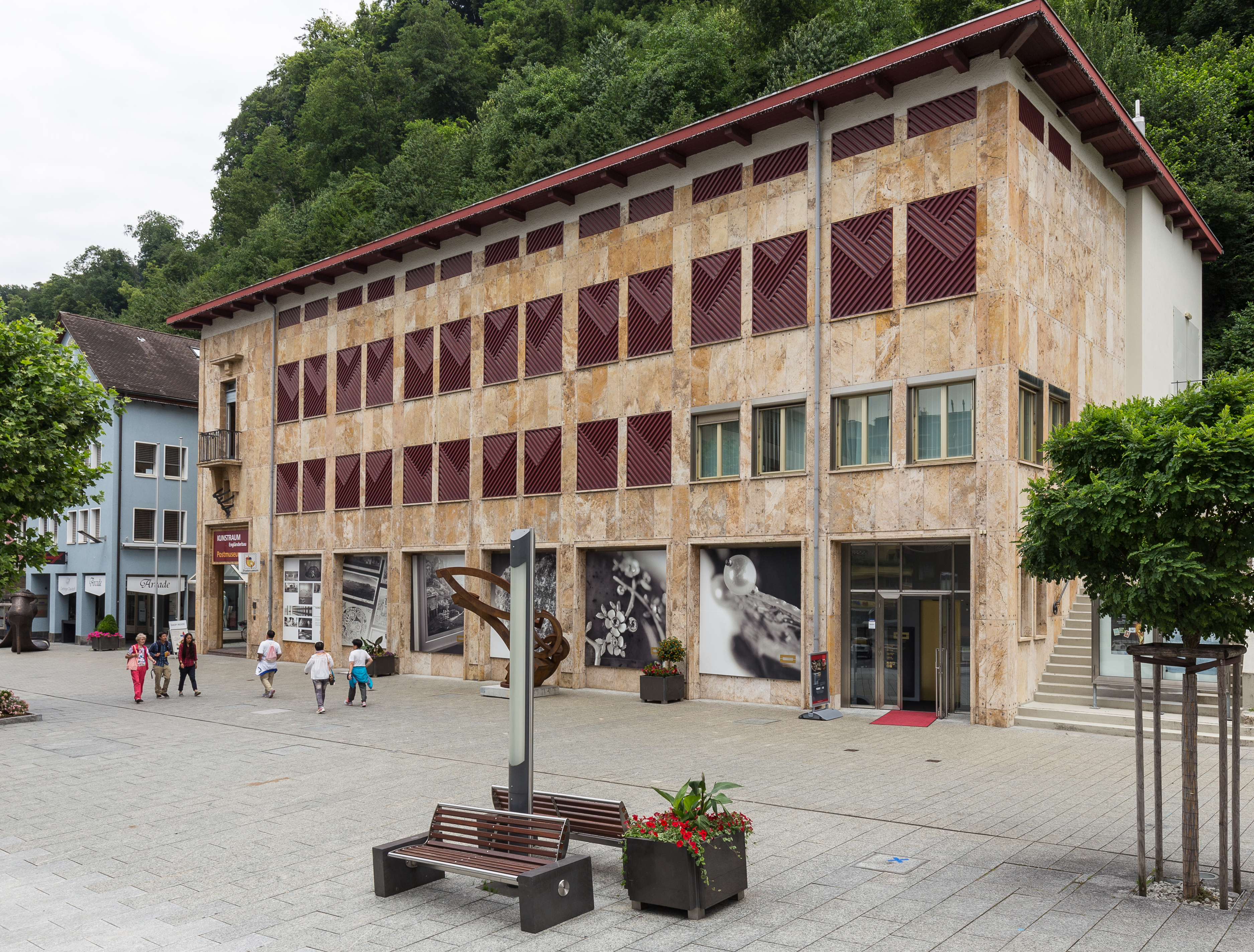 "Engländerbau" Kunstraum und Postmuseum in Vaduz